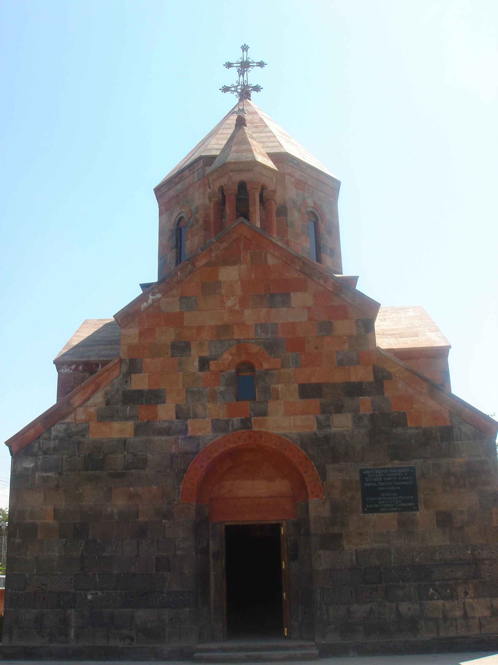 l'glise d'Arevshat dans la région d'Artachat